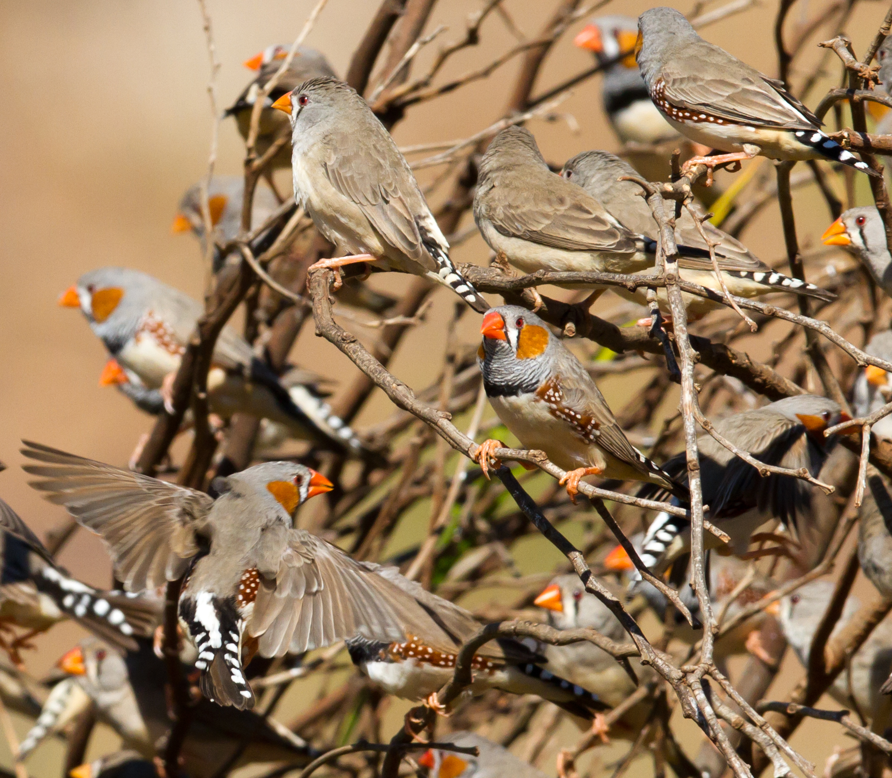 Chaos at drinking time